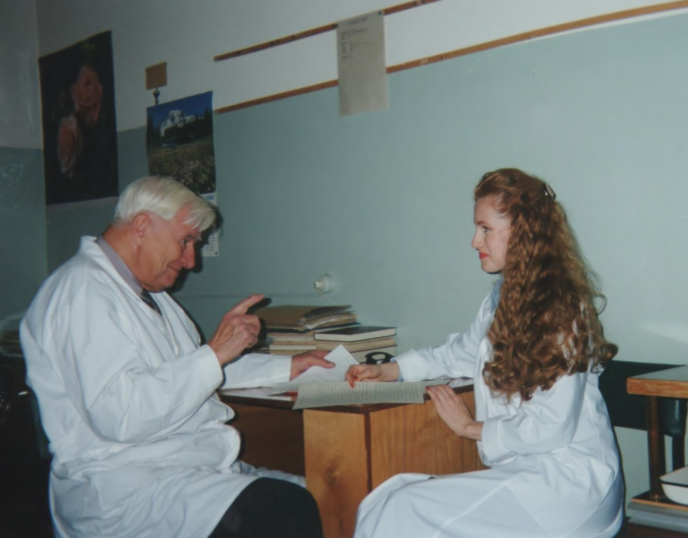 Виктор Эдуардович Колла консультирует аспиранта.